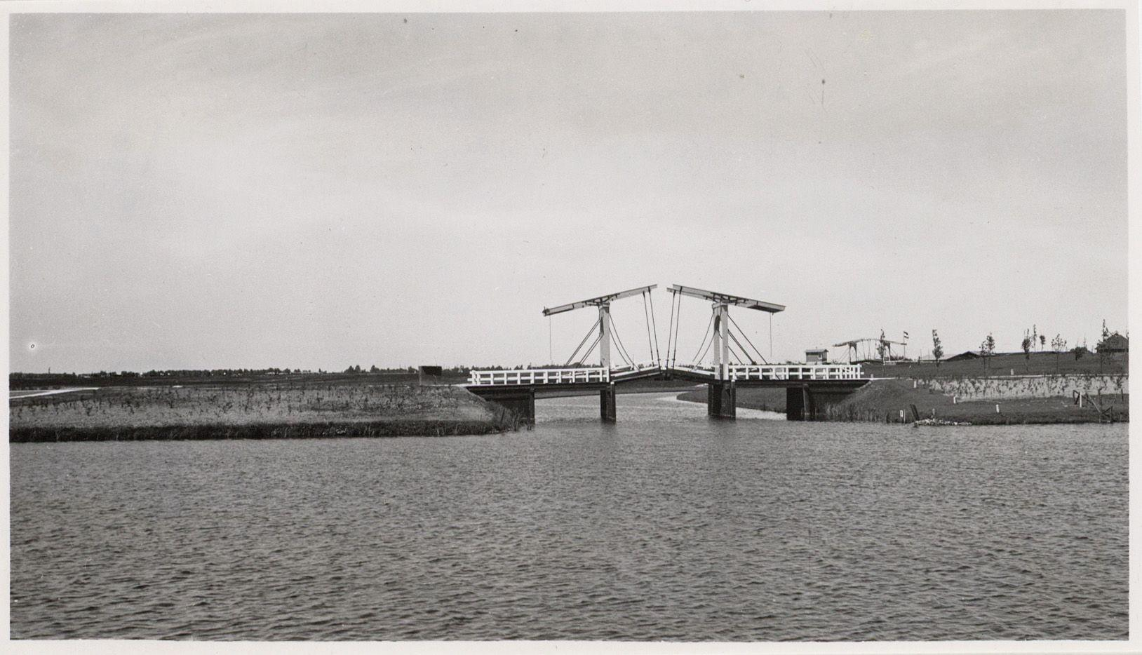 Beschrijving Amstelveen/Bosbaan Gemeente Nieuwer-Amstel. Roeibaan Amsterdamse Bos Documenttype foto Vervaardiger Eck, J. van (Jacobus, 1873-1946) Collectie Collectie J. van Eck: foto's Datering juni 1937 Geografische naam Amstelveen Bosbaan (Amstelveen) Inventarissen Afbeeldingsbestand A01634001726 Generated with Dememorixer